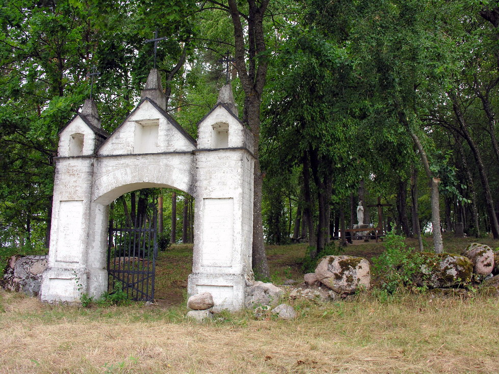 Svirkančiai, Mažeikių rajonas, Viekšnių seniūnija Svirkančių kaimo kapinaitės (neveikinačios) Foto: Algirdas, 2006 m. liepos 18 d., Lietuva